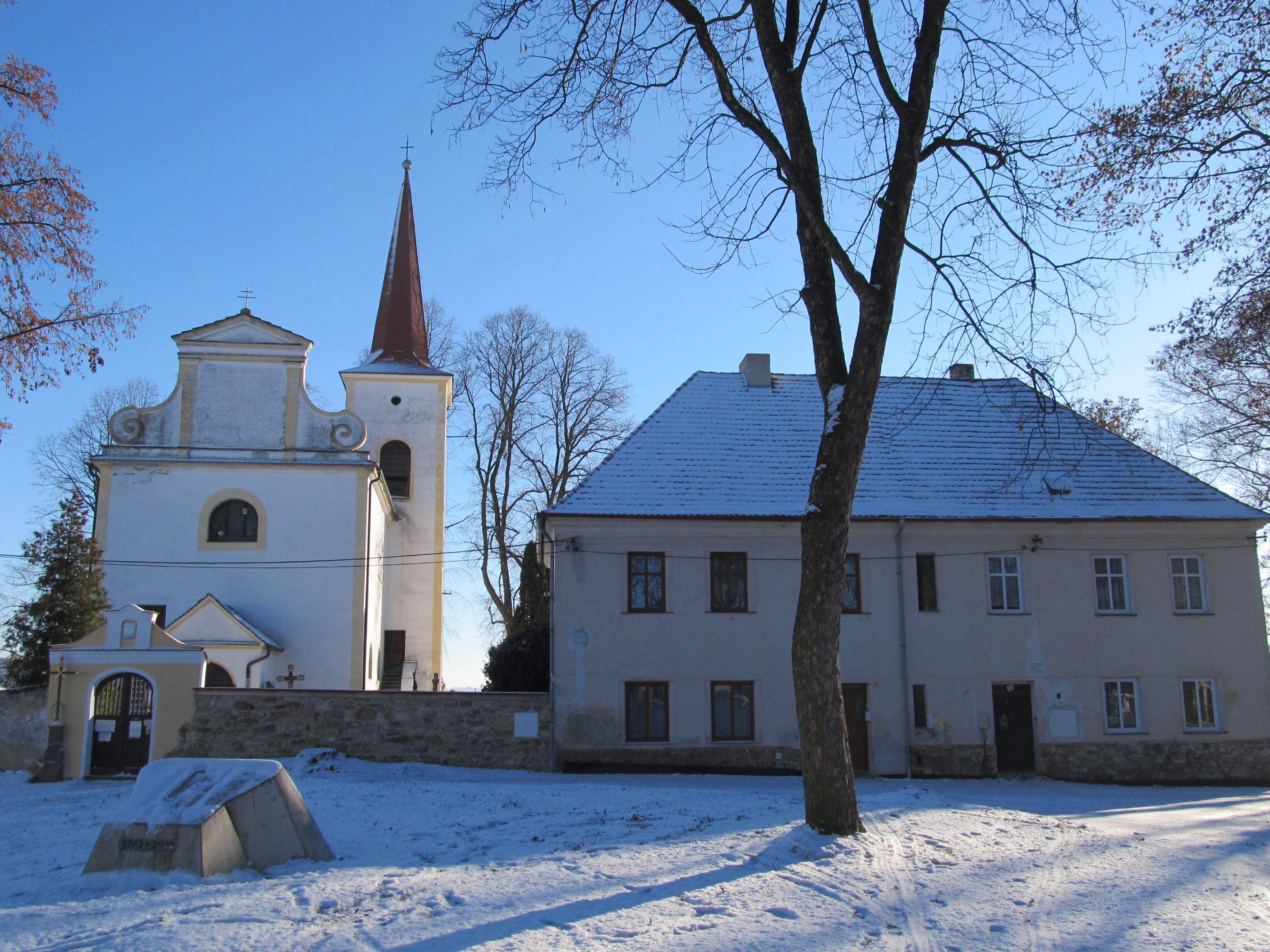 Dub - kostel Rozeslání sv. apoštolů a fara